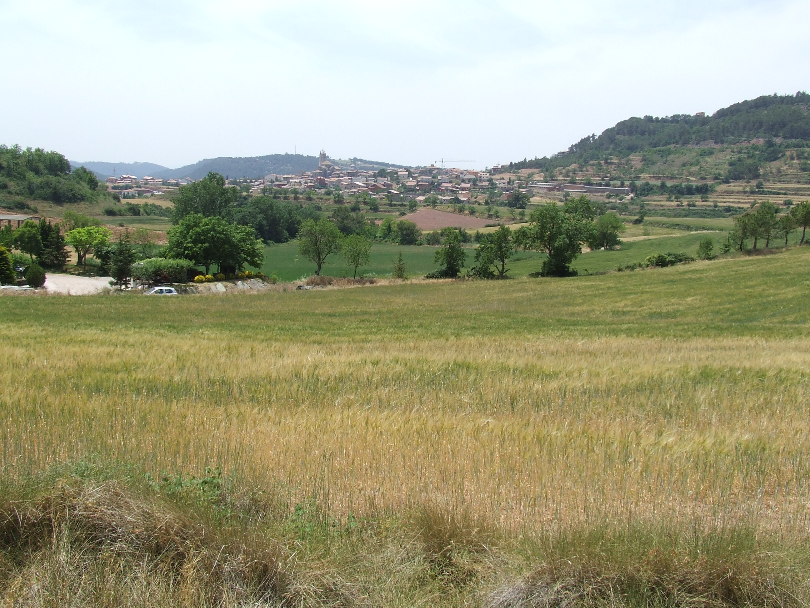 La vila de Moià, des del nord-est (Moianès)